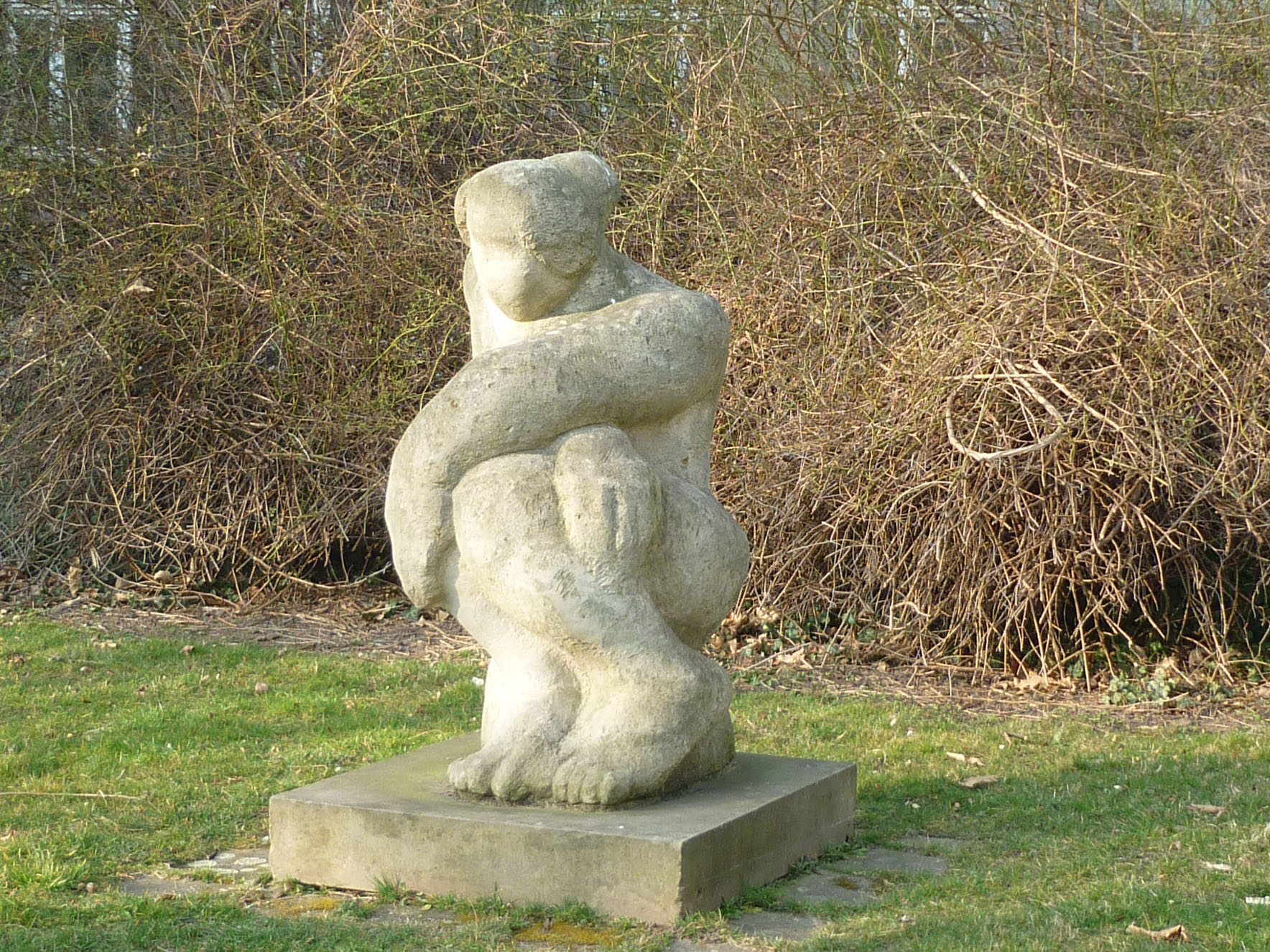 Skulptur "Besinnung" am Willers-Bau der TU Dresden, Zellescher Weg (Charlotte Sommer-Landgraf, 1981)